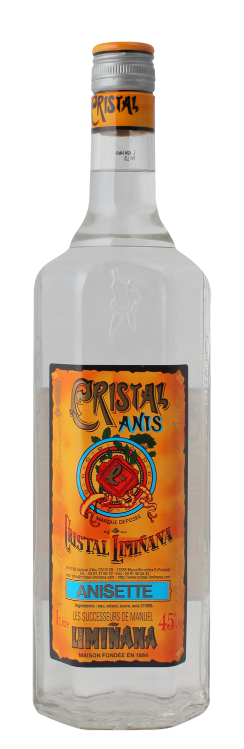 Anisette Cristal Anis